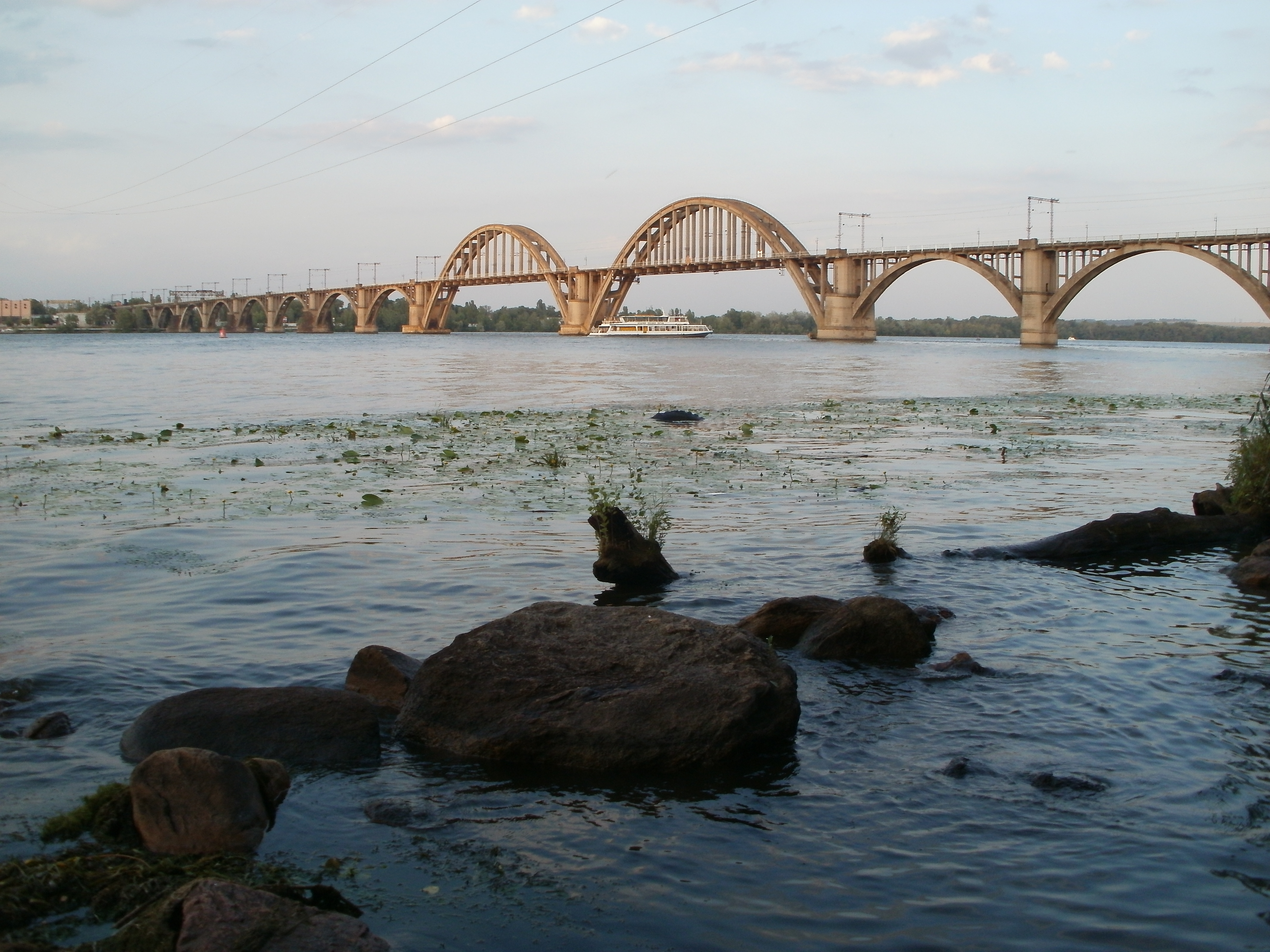 Парк ім. Шевченка, м. Дніпропетровськ пл. ім. Шевченка, 1